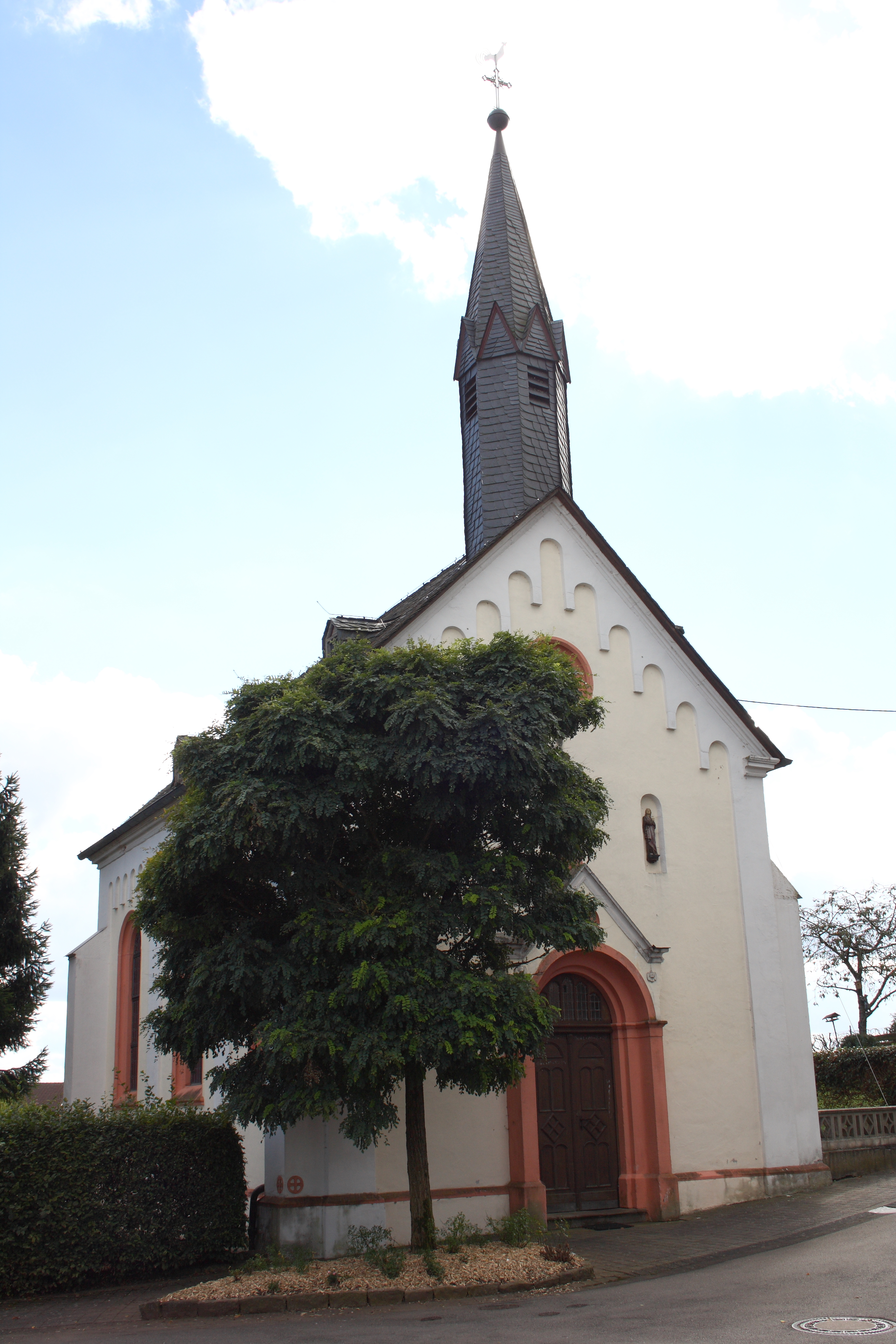 Katholische Filialkirche St. Martin in Schwarzenborn im Landkreis Bernkastel-Wittlich (Rheinland-Pfalz)